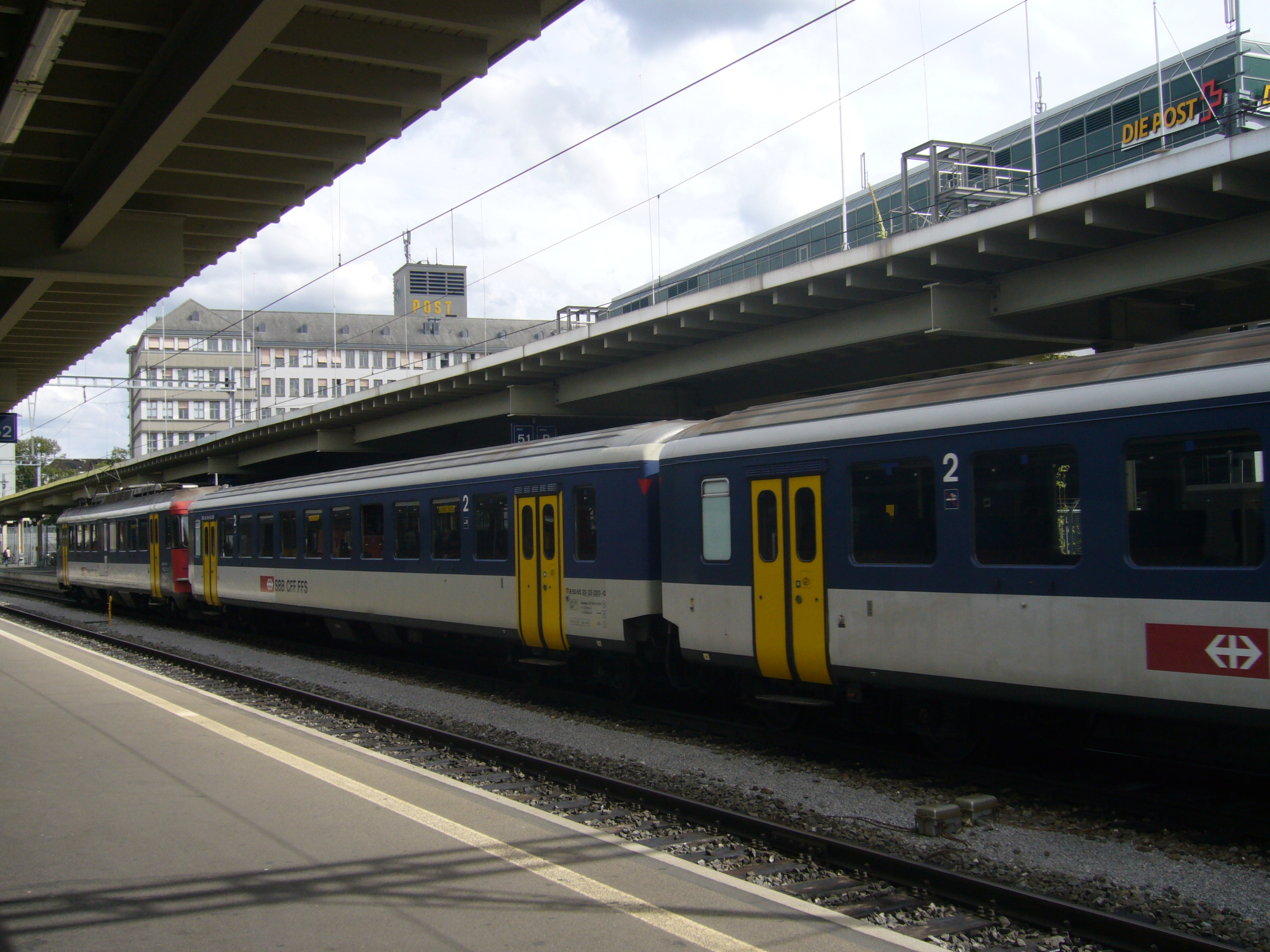 Von RBe 540 gezogner Triebzug bey der Einfahrt in Hauptbahnhof Zürich; im Hintergrund die Sihlpost.